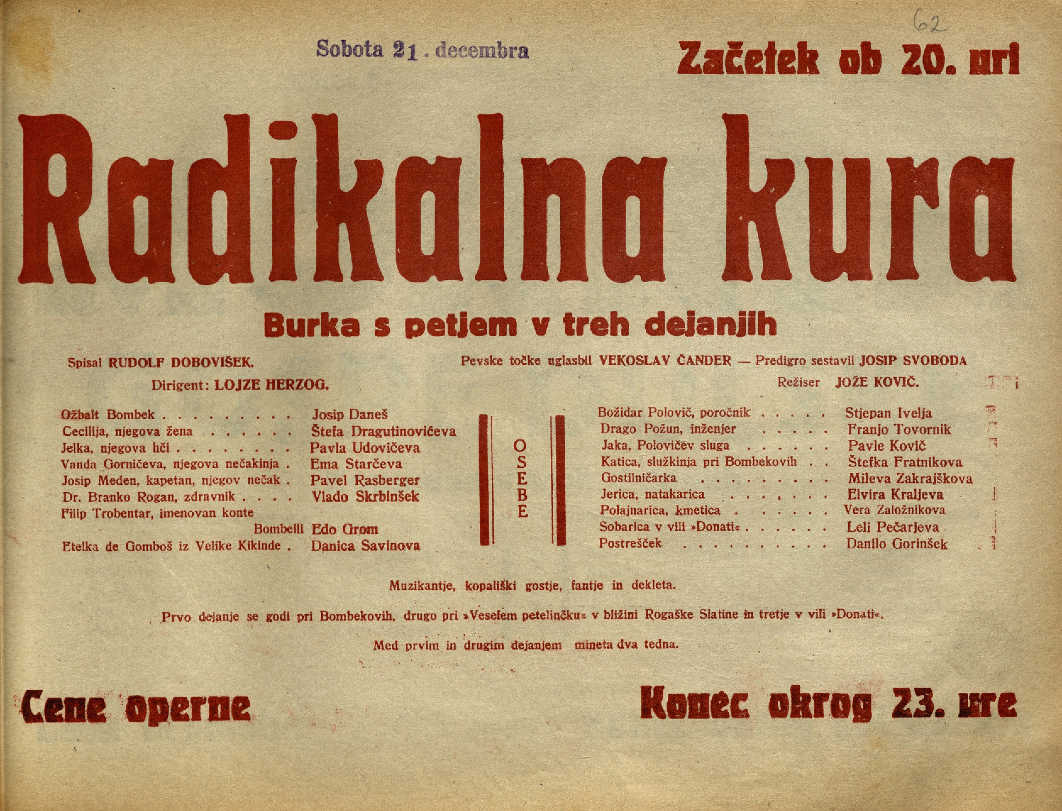 Plakat za predstavo Radikalna kura v Narodnem gledališču v Mariboru.